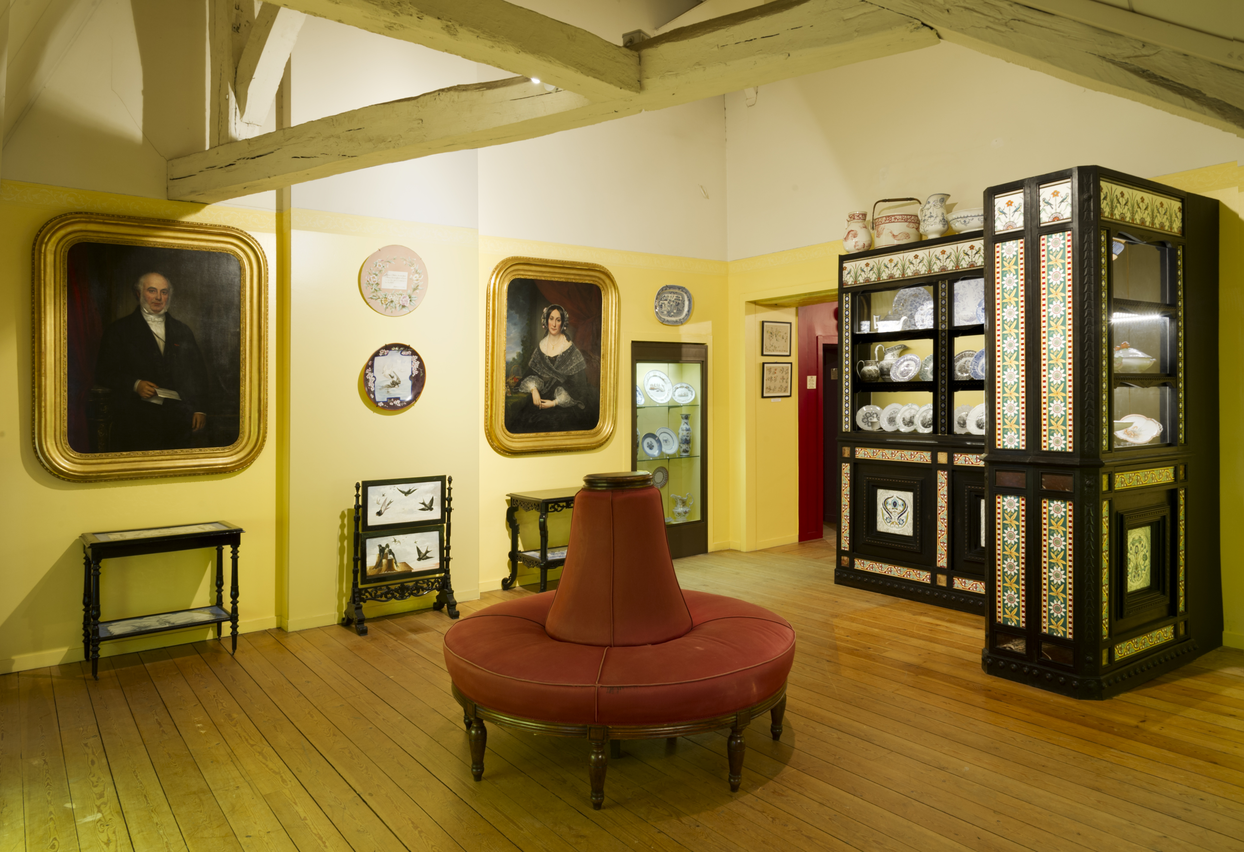 Inauguration de la salle permanente Jules Vieillard en juin 2015 du musée des arts décoratifs et du design de Bordeaux (Gironde, France).